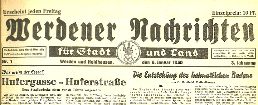 Zeitungskopf der Werdener Nachrichten Nr. 1 vom 6. Januar 1950.